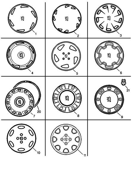 Enjoliveur